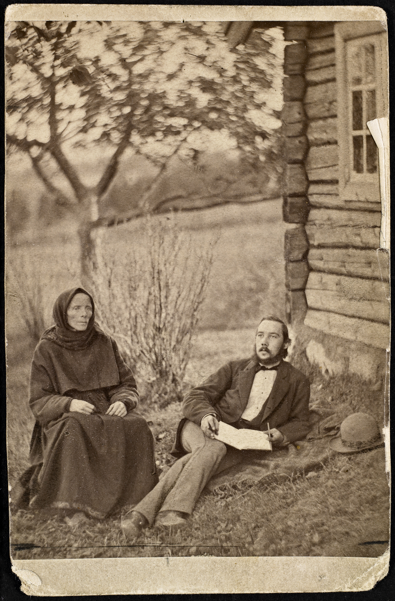 Tittel / Title: Liv Brattefud af Bø herad fortæller æventyr for Moltke Moe (1859-1913) Beskrivelse / Description: Visittkort / Carte de visite. Moe var sønn av Jørgen Moe (1813-1882), og folklorist. Da faren og P. C. Asbjørnsen døde, overtok han utgivelsen av eventyrene, og utga flere reviderte og fornorskede utgaver. Dato / Date: sommeren 1878 Fotograf / Photographer: ukjent / unknown Eier / Owner Institution: Nasjonalbiblioteket / National Library of Norway Lenke / Link: Bildesignatur / Image Number: blds_01062